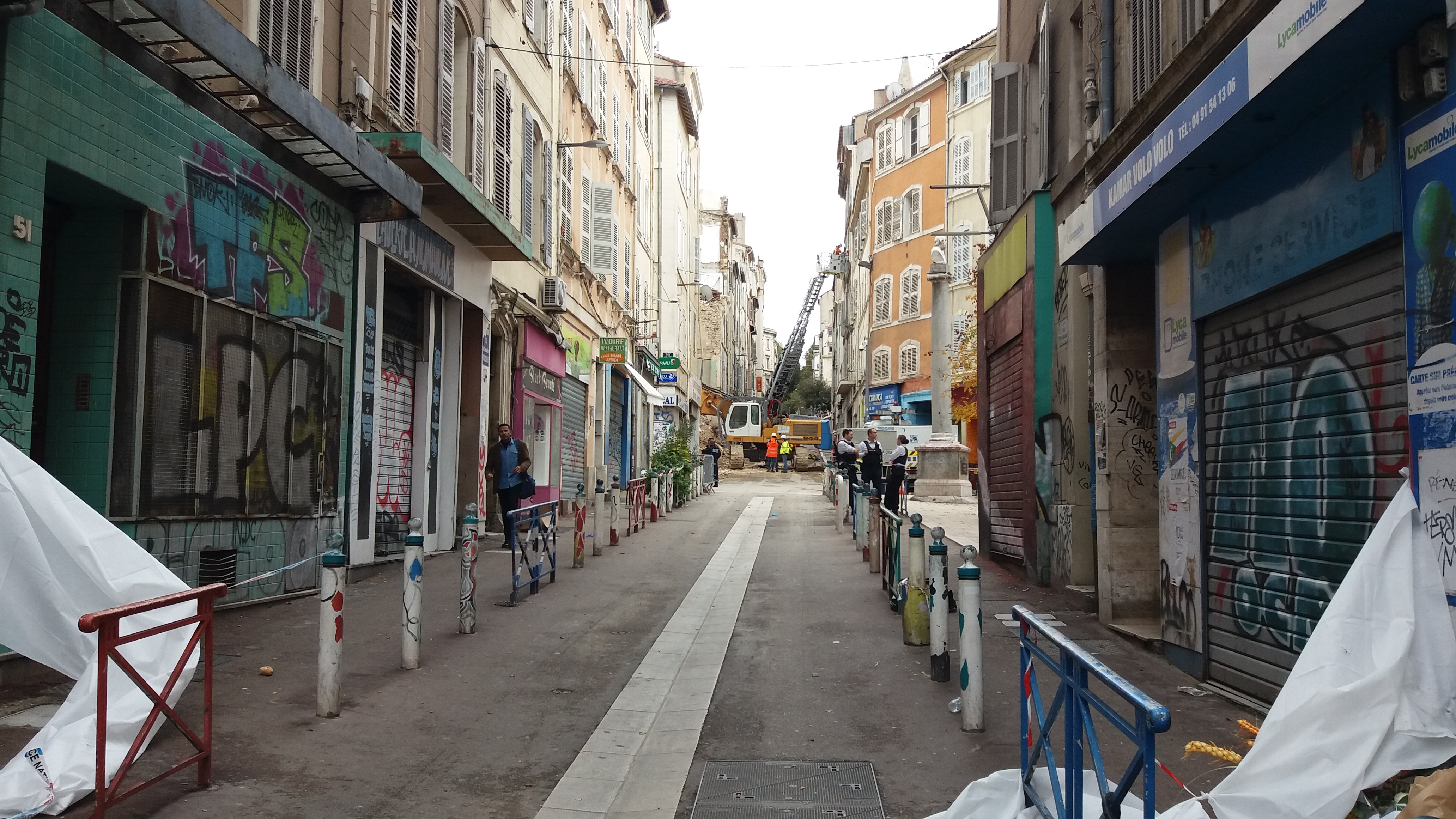 La rue d'Aubagne, après l'effondrement des immeubles n°63 et 65, à Marseille (Bouches-du-Rhône, France)